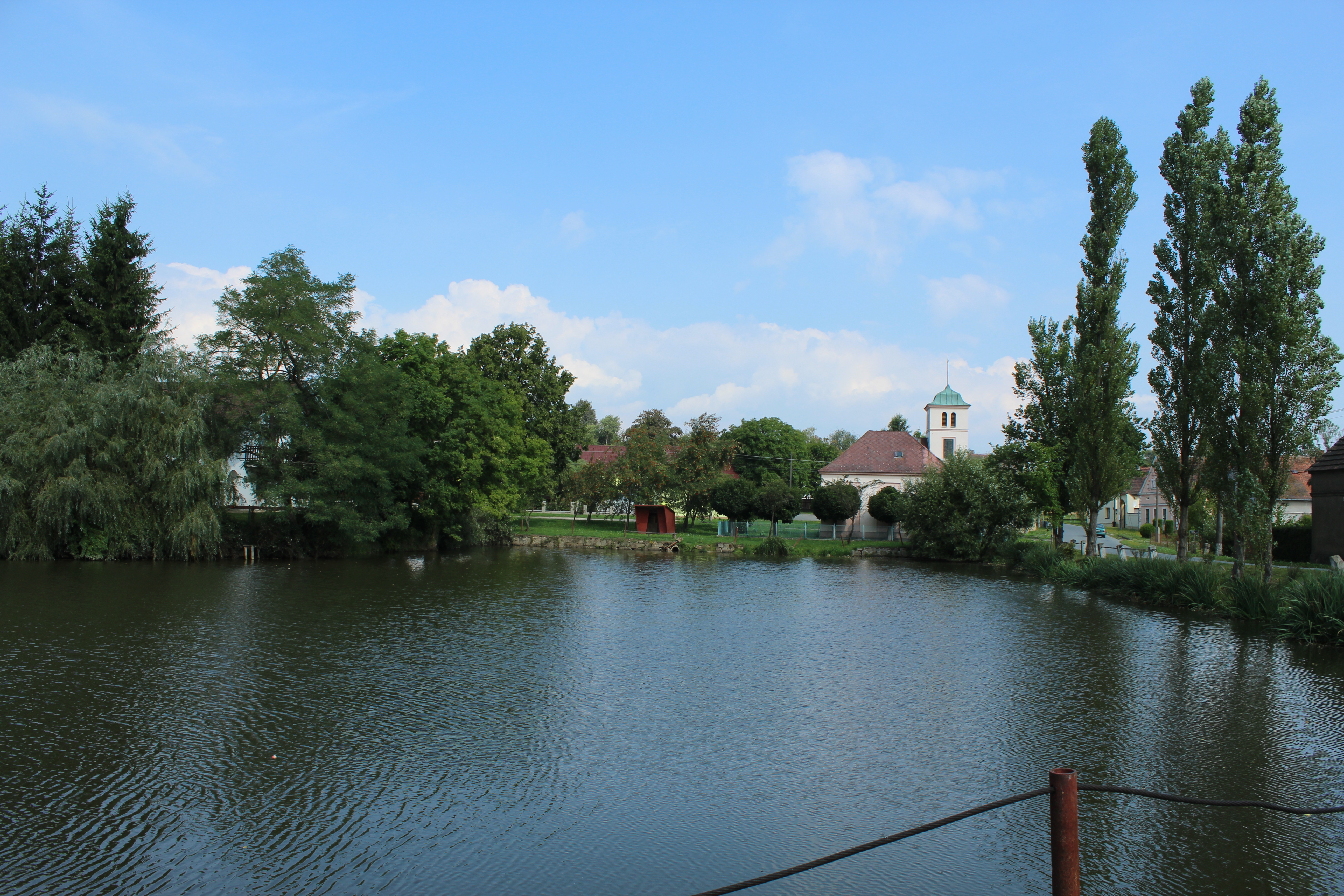 Kaple z protějšího břehu rybníka, Darmyšl.